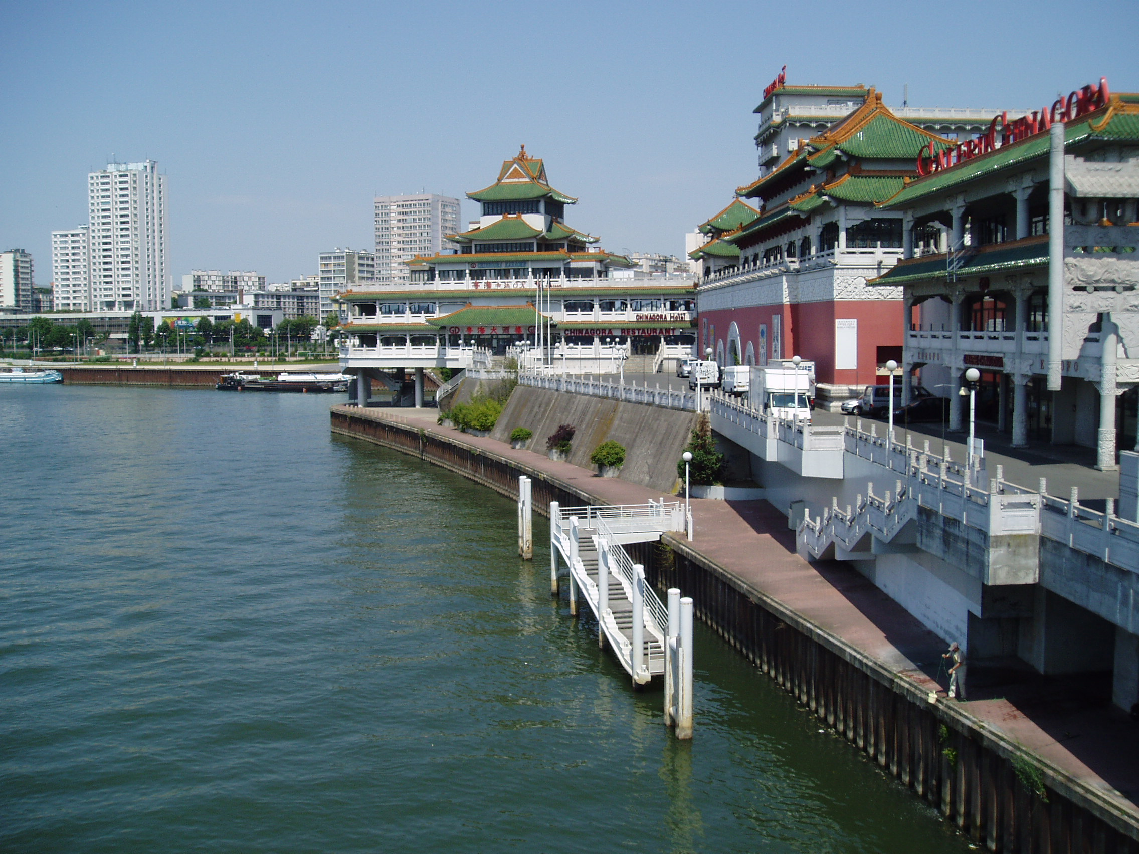 Vue de "Chinagora" : batiment de style chinois, depuis le pont d'Ivry. Il se situe à Alfortville (94140 - Val de Marne - France)